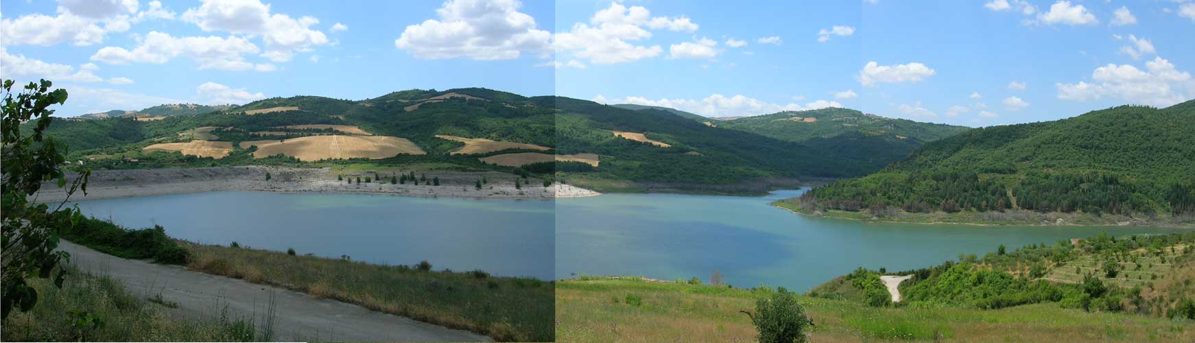 Lago di Acerenza (composizione di più foto)